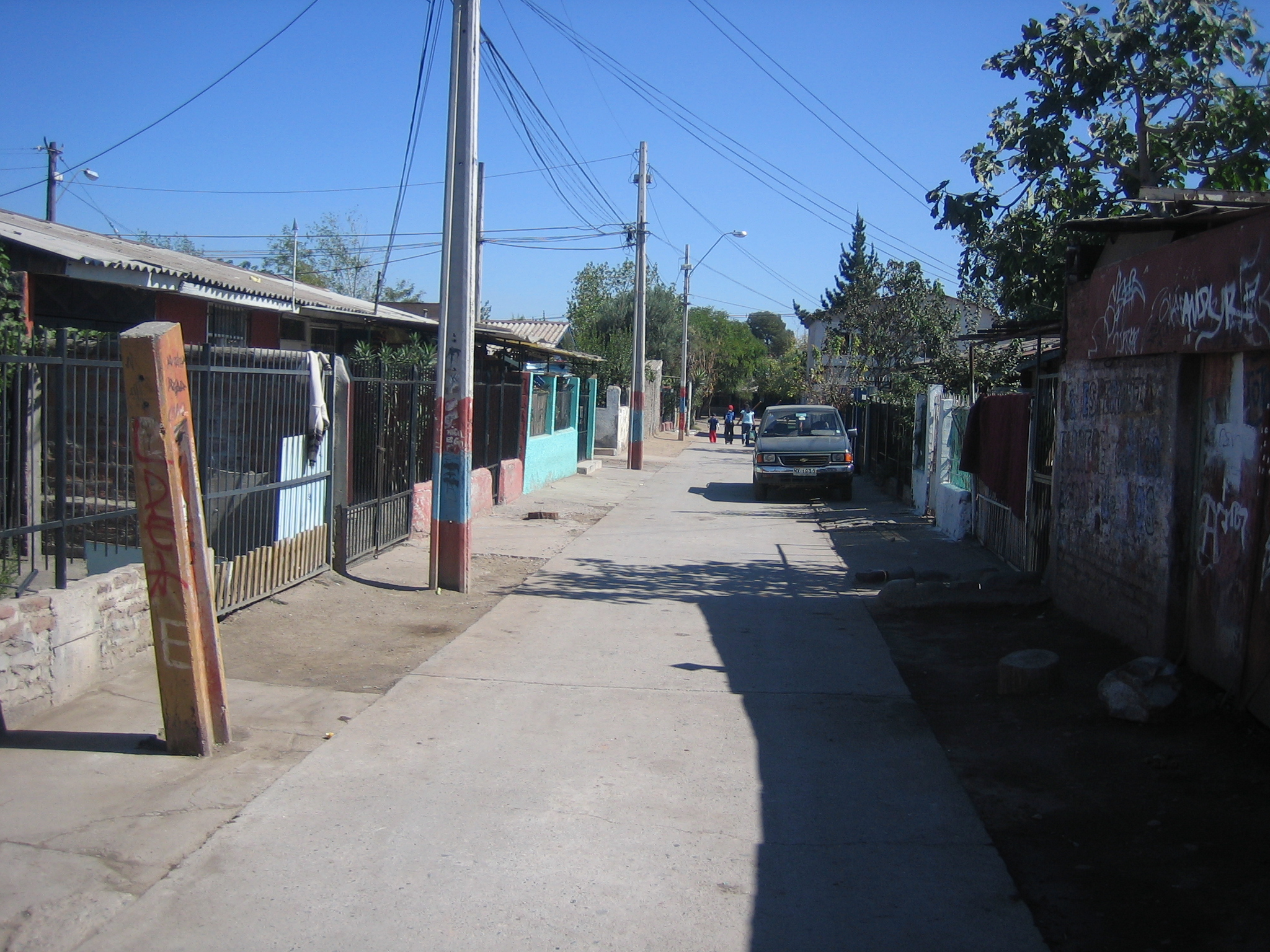 Von mir aufgenommen.